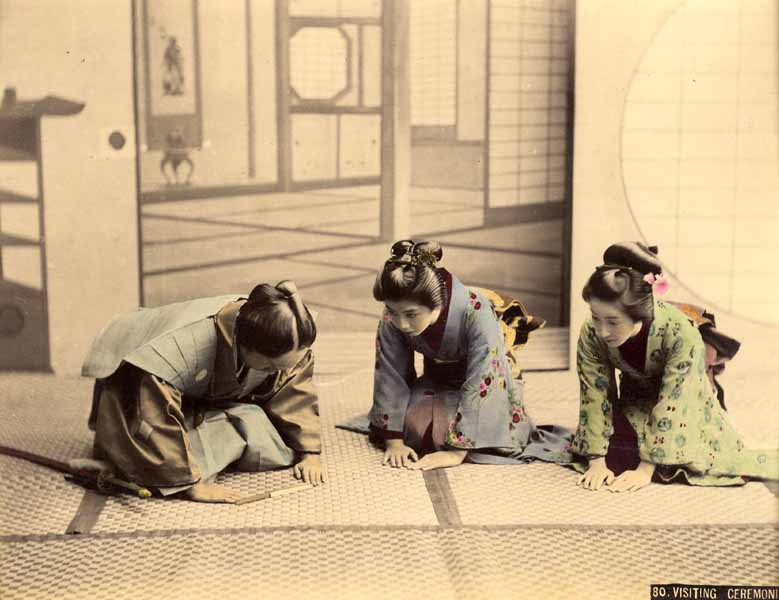 Tirage albuminé rehaussé. 21 x 26 cm.